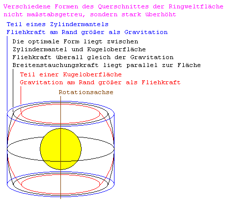 RINGWELT_QUERSCHNITTE